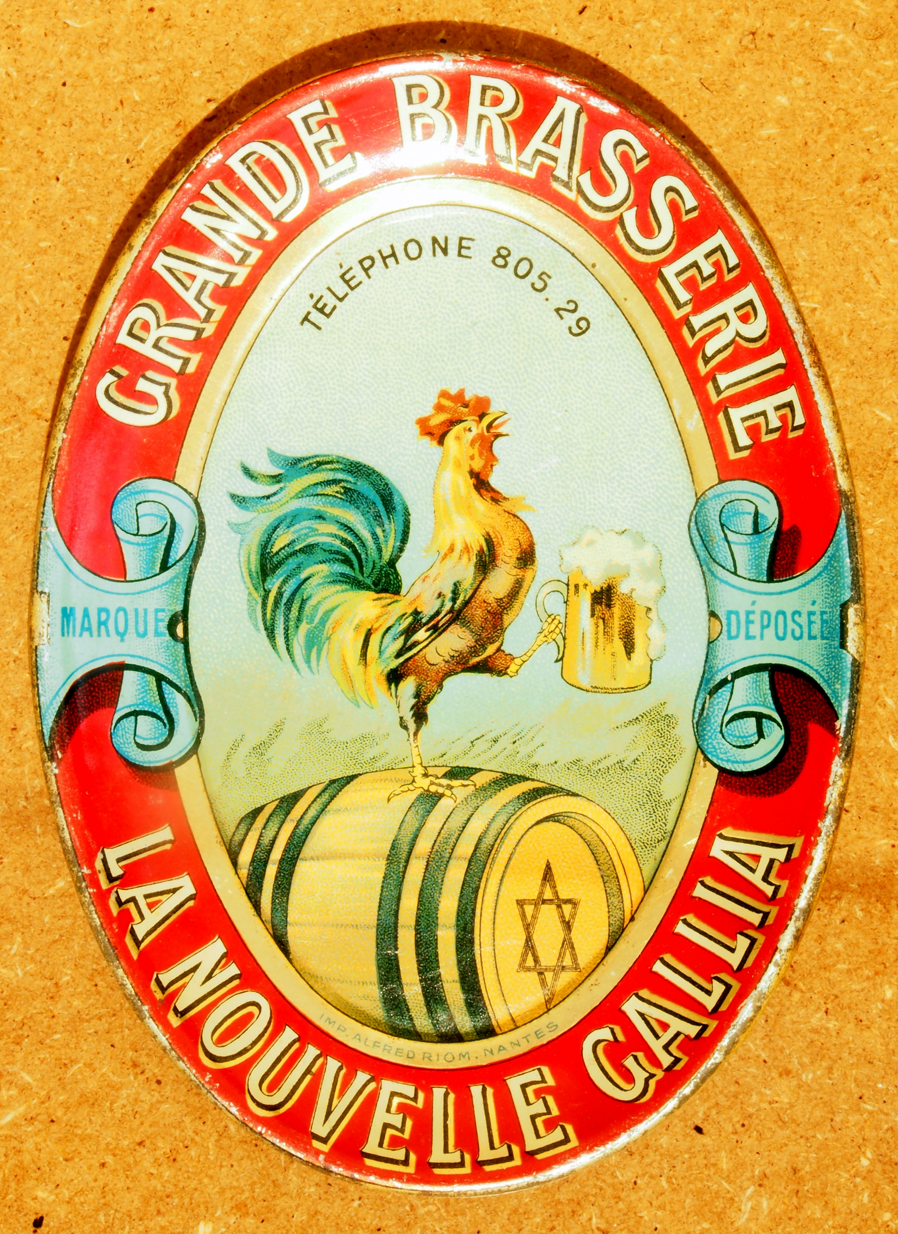 Grande Brasserie La Nouvelle Gallia, Musée Européen de la Bière.